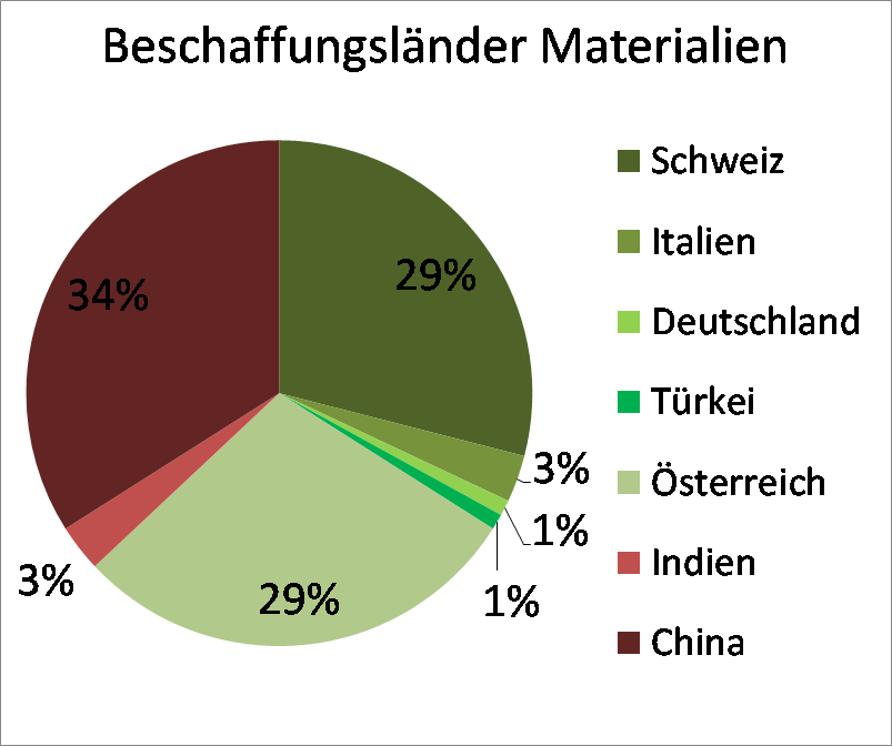 Anteile der Länder an der Materialbeschaffung Calidas 2011